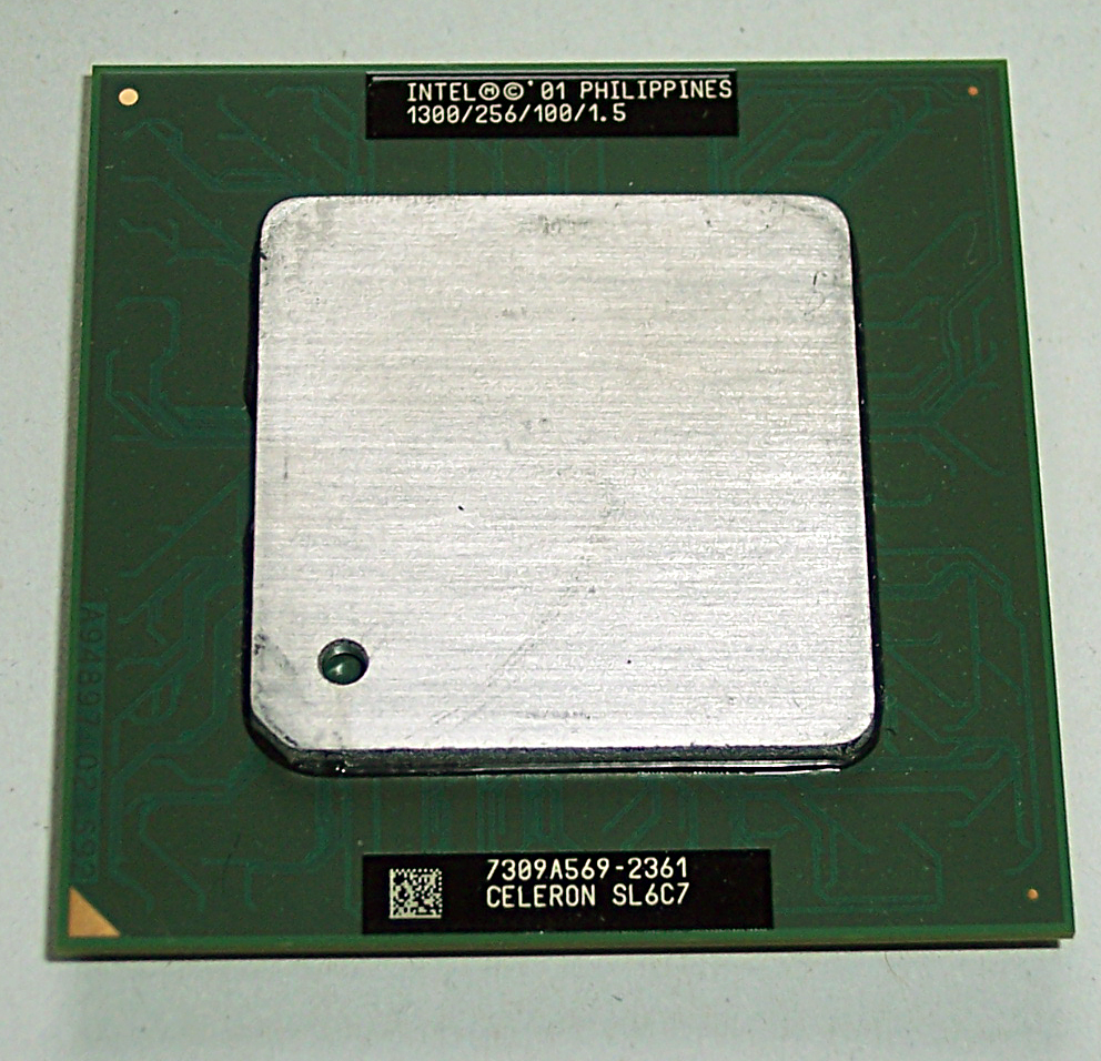 Celeron mit Tualatin Kern 1300 Mhz